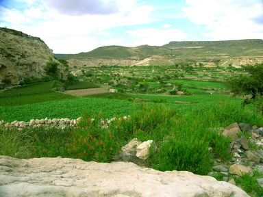 sirba